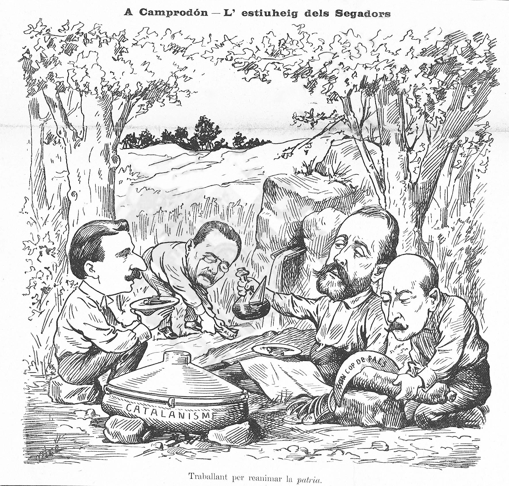 A Camprodón - L' estiuheig dels Segadors.